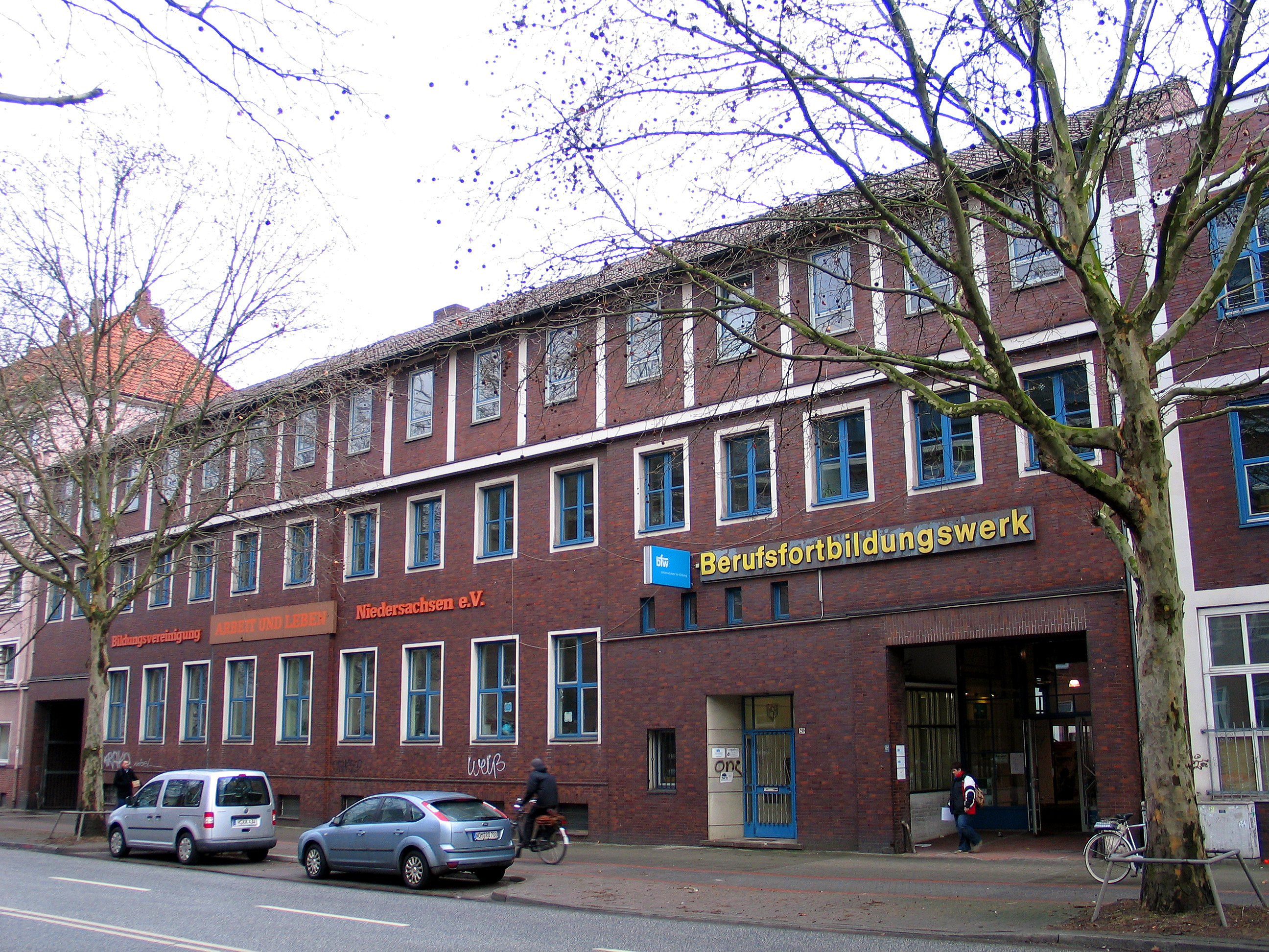 Arndstraße 20 in Hannover-Mitte: Das Gebäude der ehemaligen Eisen-Aktiengesellschaft Heinrich August Schulte nutzt heute (Stand: 02/2013) die Bildungsvereinigung Arbeit und Leben Niedersachsen e.V. und das Berufsfortbildungswerk (BfW) ...